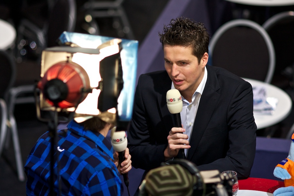 Pieter van den Hoogenband, European short course championships 2010 Eindhoven